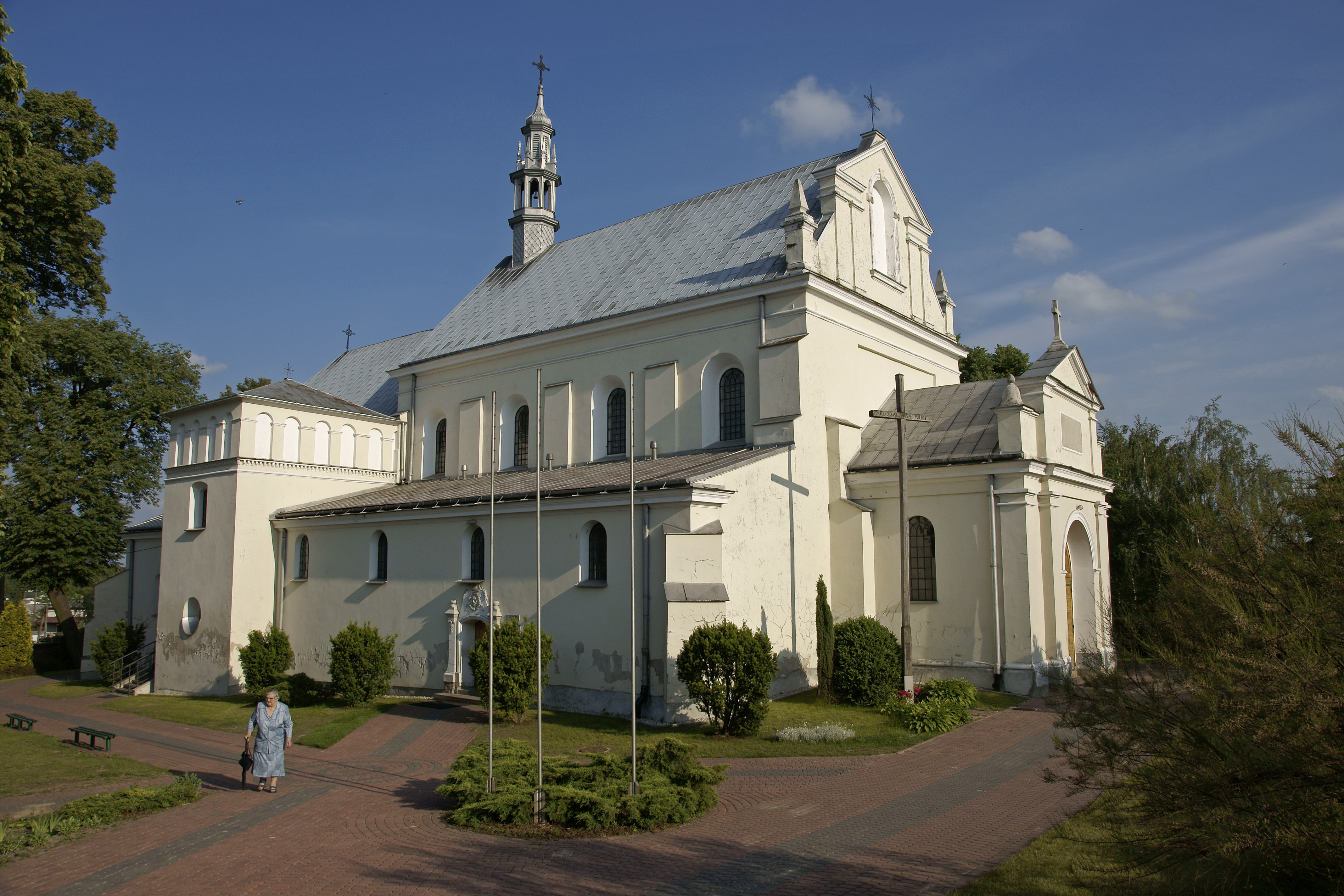 kościół par. p.w. św. Mikołaja, XIV-XVII, XX Warka, Gmina Warka